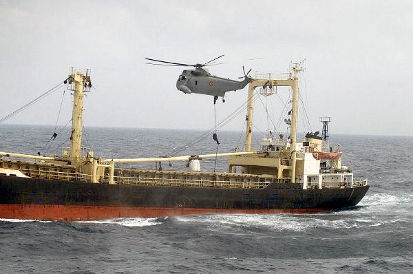 Asalto por parte de la fragata Navarra y el buque de aprovisionamiento Patiño al buque norcoreano So Sang